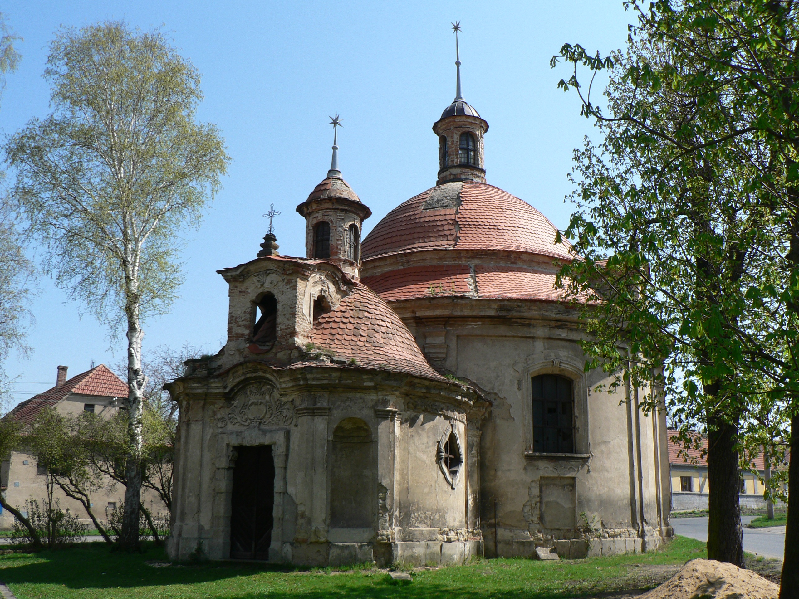 Kaple Všech Svatých v Rohatcích.